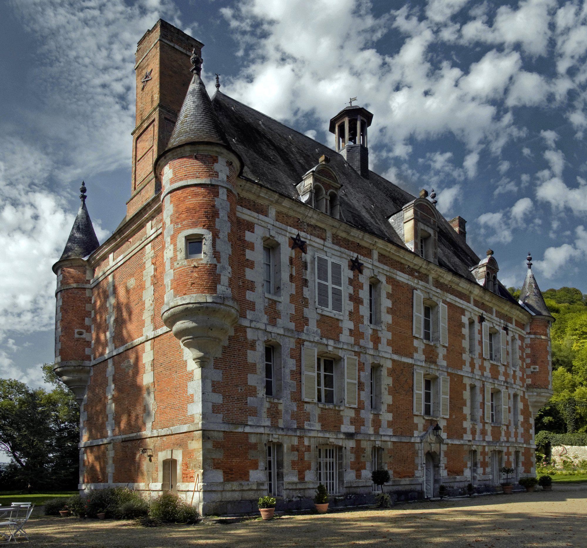 Château de Canteloup (Inscrit) .